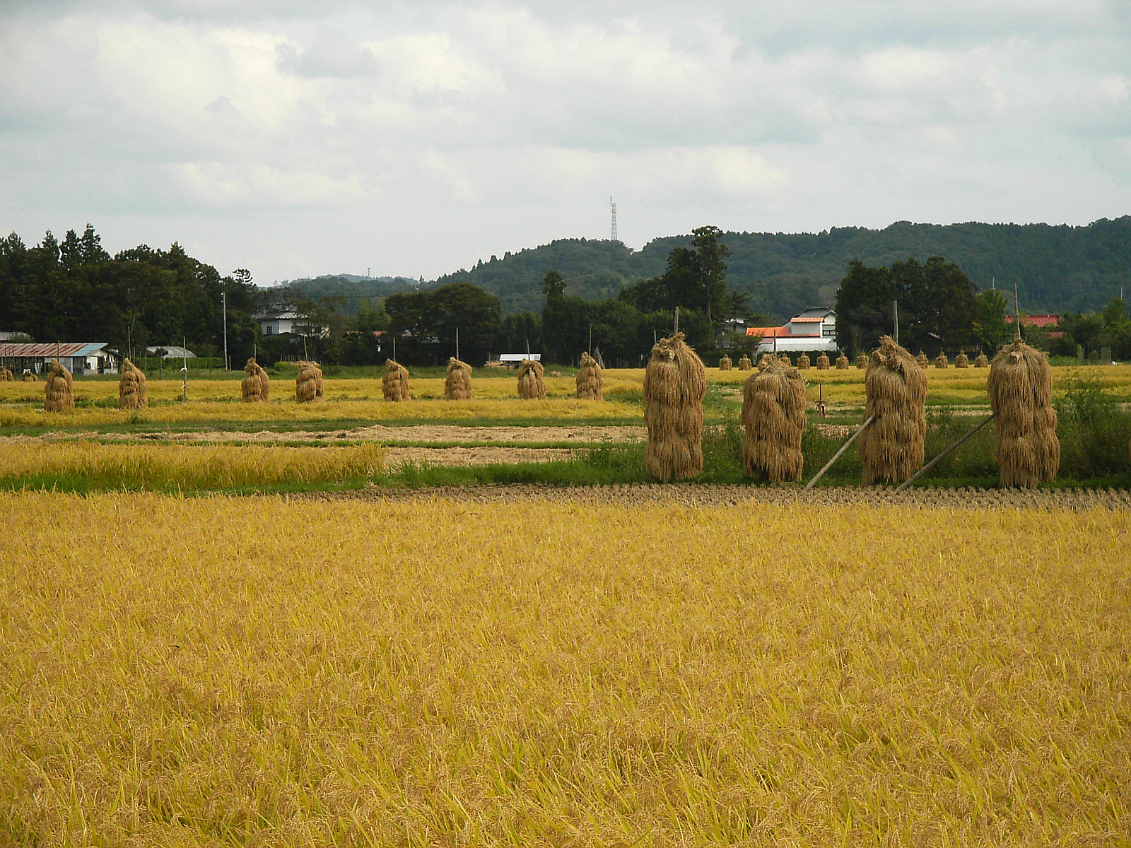 Japanese Rice paddy in autumn. Kurihara, Miyagi prefecture, Japan.